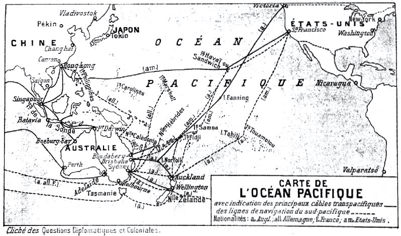 Carte de l'océan Pacifique, avec indication des principaux câbles transpacifiques et des lignes de navigation du sud-Pacifique. Revue : Questions diplomatiques et coloniales, tome XXI, janvier-juin 1906.